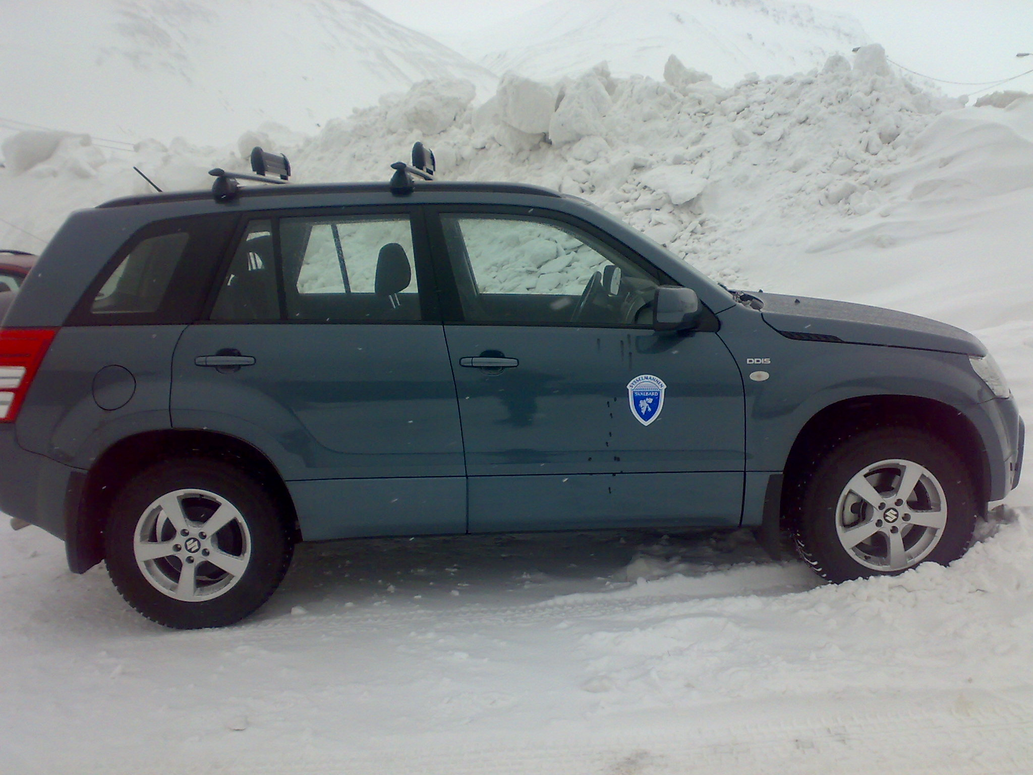 Sysselmannen car, Longyearbyen